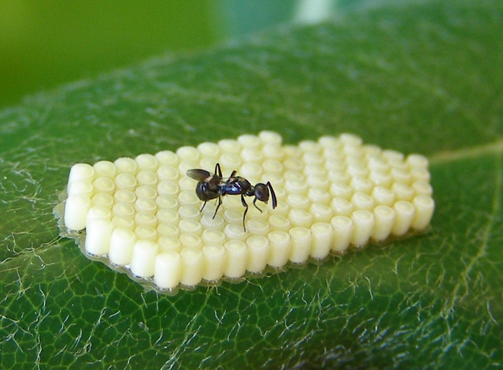 Anastatus bifasciatus pondant dans un oeuf de Nezara viridula. Seuls des mâles ont émergé des oeufs parasités.